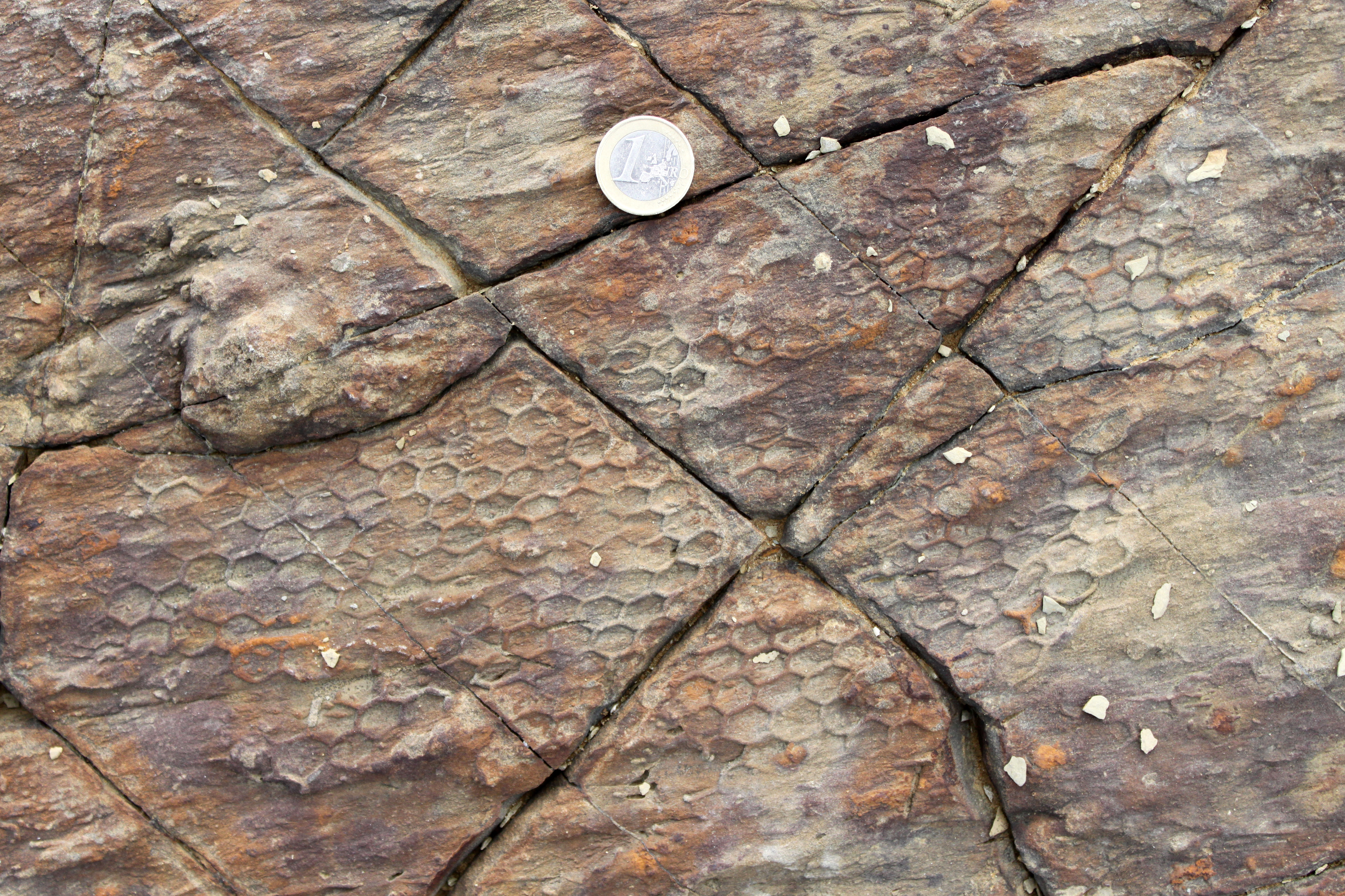 Paleodictyon, probablemente P. strozzii en arenisca de los flyschs de la punta de San García. Complejos del Campo de Gibraltar, Unidad de Algeciras (Oligoceno-Mioceno). Algeciras, Andalucía, España.